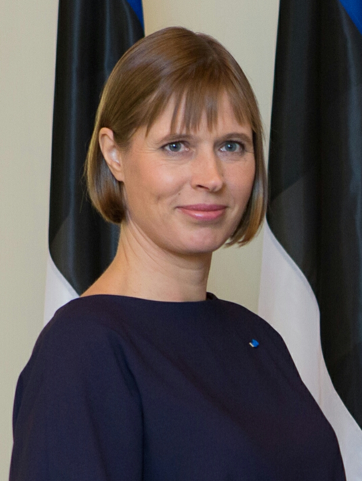 Prezydent Estonii Kersti Kaljulaid